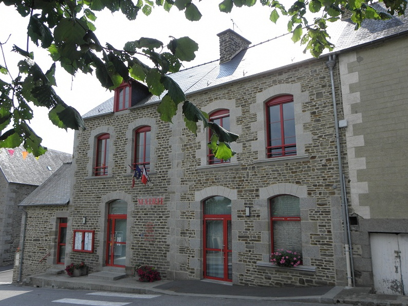 Mairie de Sacey (50).